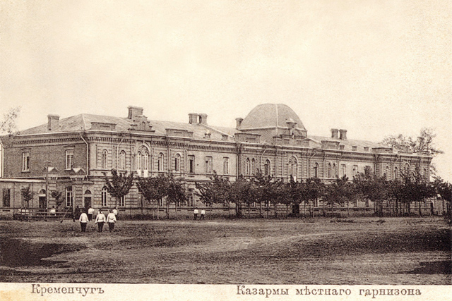 Postcards of old Kremenchuk. Казарма місцевого гарнізону.